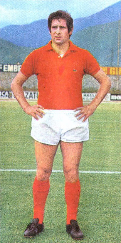 Il calciatore italiano Renato Cappellini alla Roma all'inizio della stagione 1970-71.